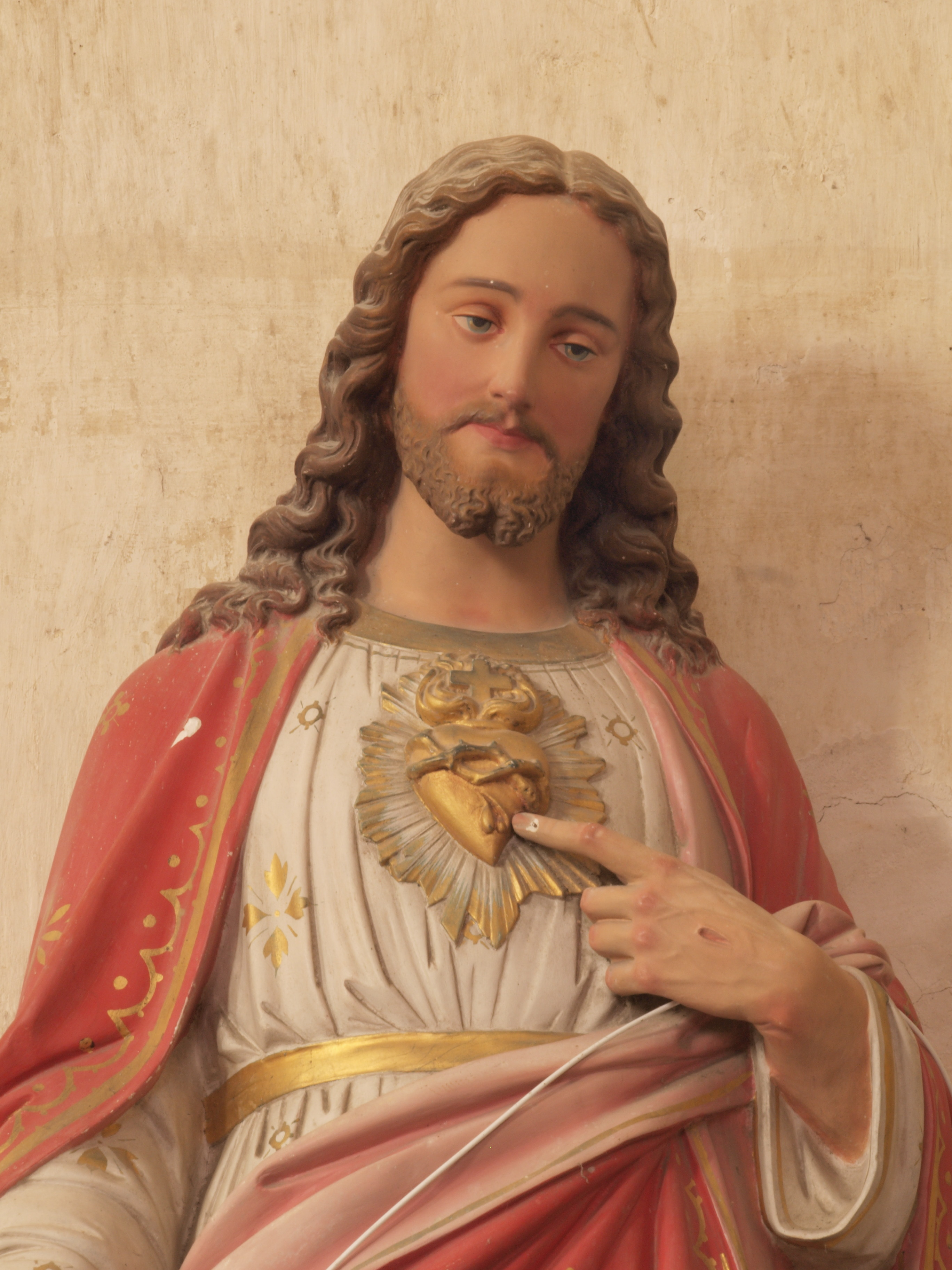 Sainpuits (Yonne, France) ; l'intérieur de l'église. Statue de Jésus montrant son Sacré-Cœur.